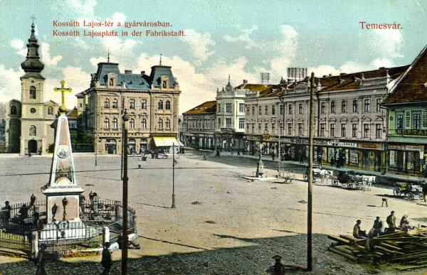 Temeswar, Fabrikstadt, Traiansplatz, mit serbisch-orthodoxer Kirche "Heiliger Georg"